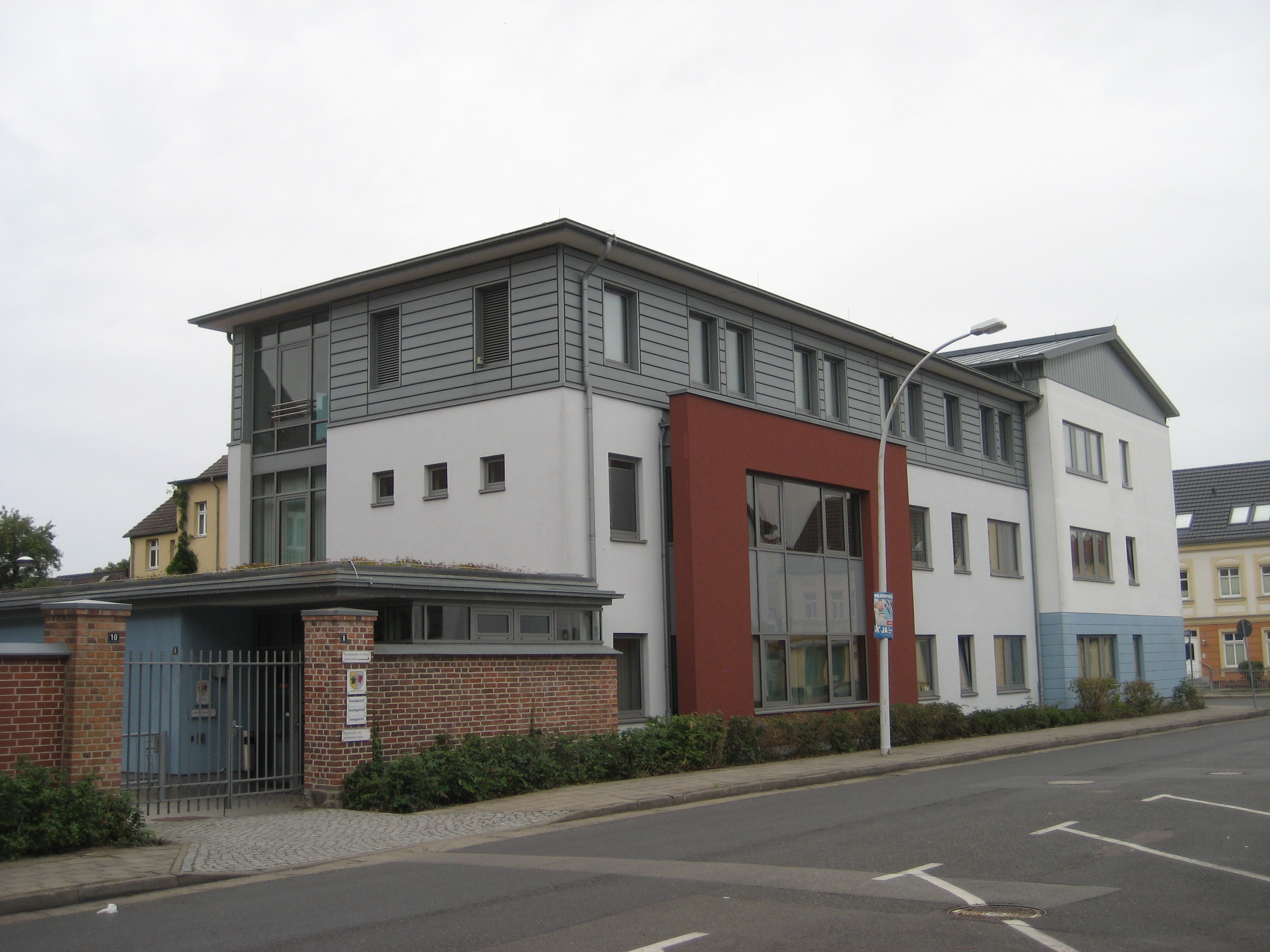 Das Sozialgericht Neubrandenburg in der Gerichtsstraße 8.